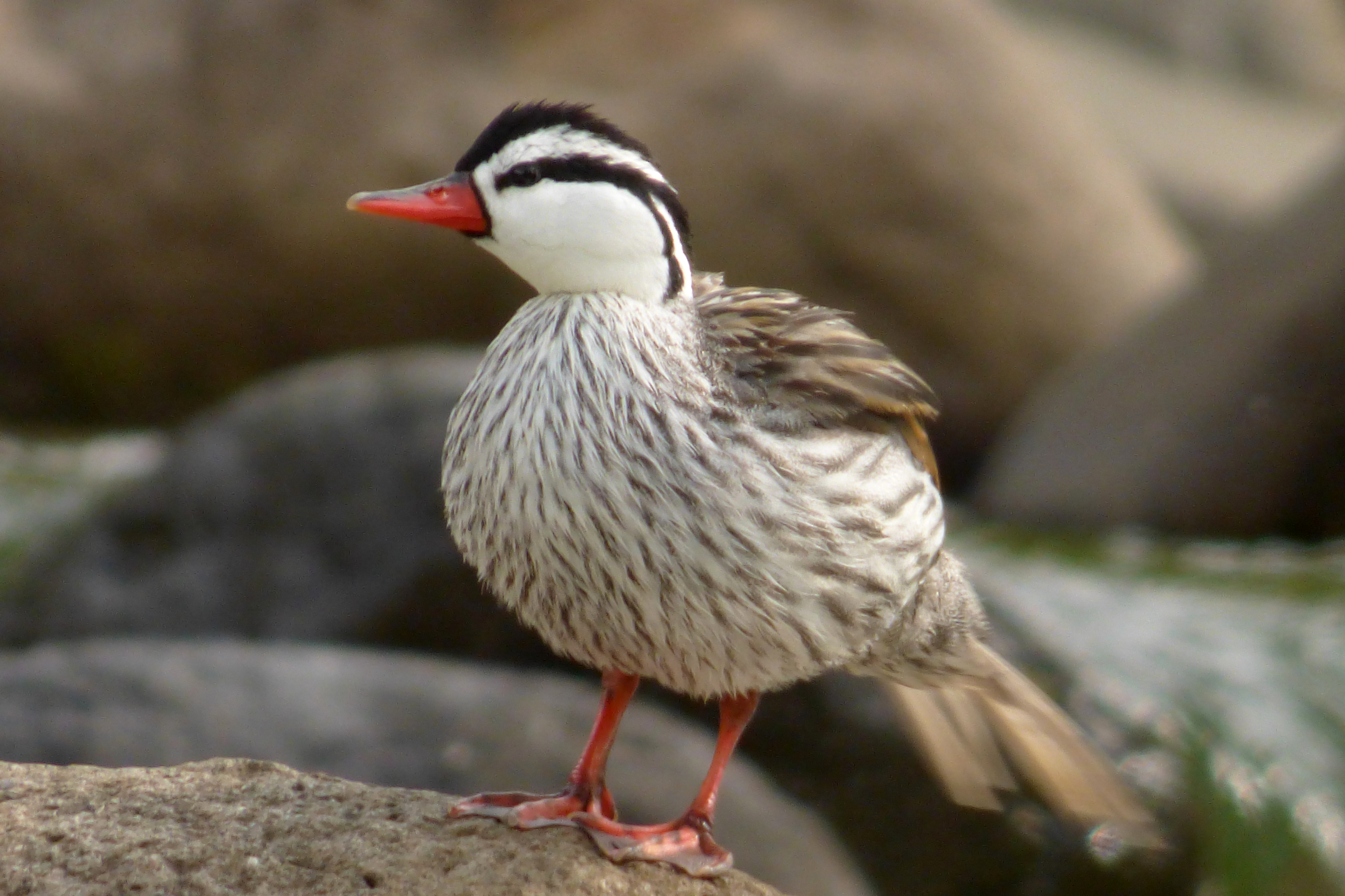 Merganetta armata (Pato de torrentes) - Macho